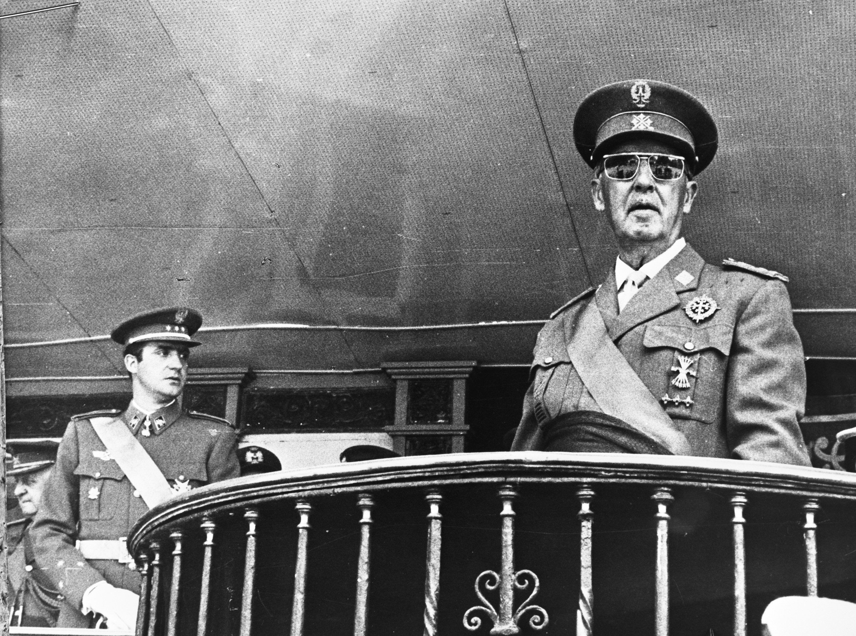 Collectie / Archief : Fotocollectie Anefo Reportage / Serie : [ onbekend ] Beschrijving : In Madrid is herdacht dat Franco 30 jaar geleden de burgeroorlog ( 1936 1939 ) won tijdens de Parade links Prins Juan Carlos de Bourbon , rechts Generaal Franco Datum : 5 juni 1969 Locatie : Madrid Trefwoorden : burgeroorlogen, herdenkingen, parades Persoonsnaam : Franco, Prins Juan Carlos de Bourbon Fotograaf : [onbekend] Auteursrechthebbende : Nationaal Archief Materiaalsoort : Negatief (zwart/wit) Nummer archiefinventaris : bekijk toegang 2.24.01.04 Bestanddeelnummer : 922-4913